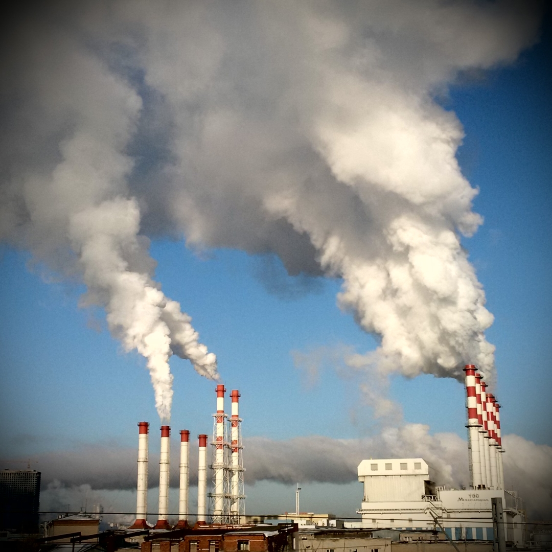 Тепловая электростанция «Международная» и районная тепловая станция «Красная Пресня» (2-я Магистральная ул., 7, вблизи 3-ей Магистральной) - котельная Москва-Сити.